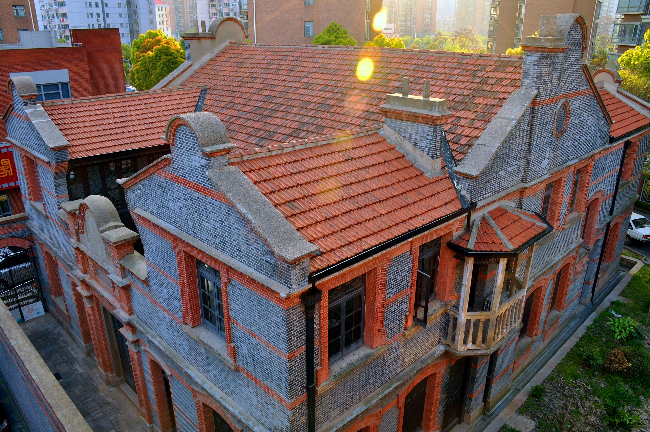 洋泾农业银行旧址 博山路202弄4号